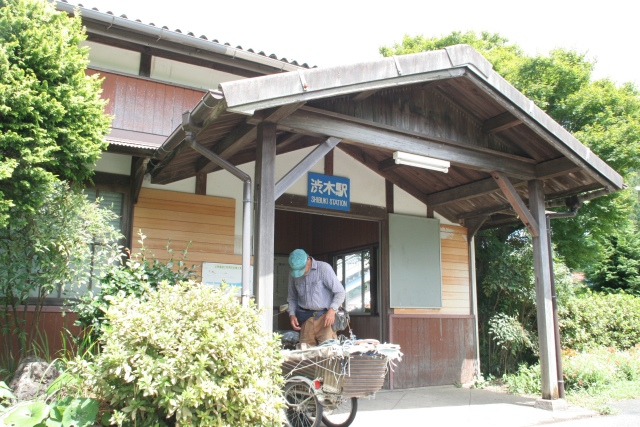 渋木駅 投稿者が撮影(2007/08/28)